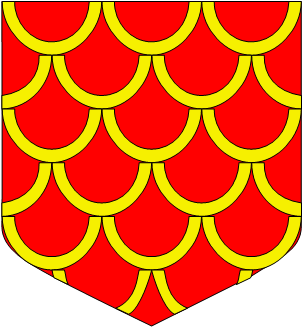 de gueules papelonné d’or, qui est de Châteaubriand (ancien)